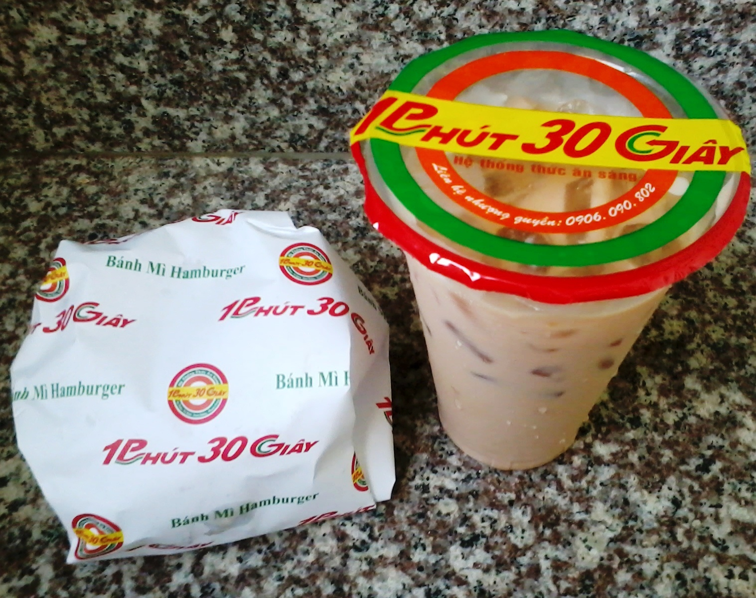 Thức ăn nhanh tại Sài Gòn với quảng cáo là sẽ phục vụ trong 1 phút 30 giây